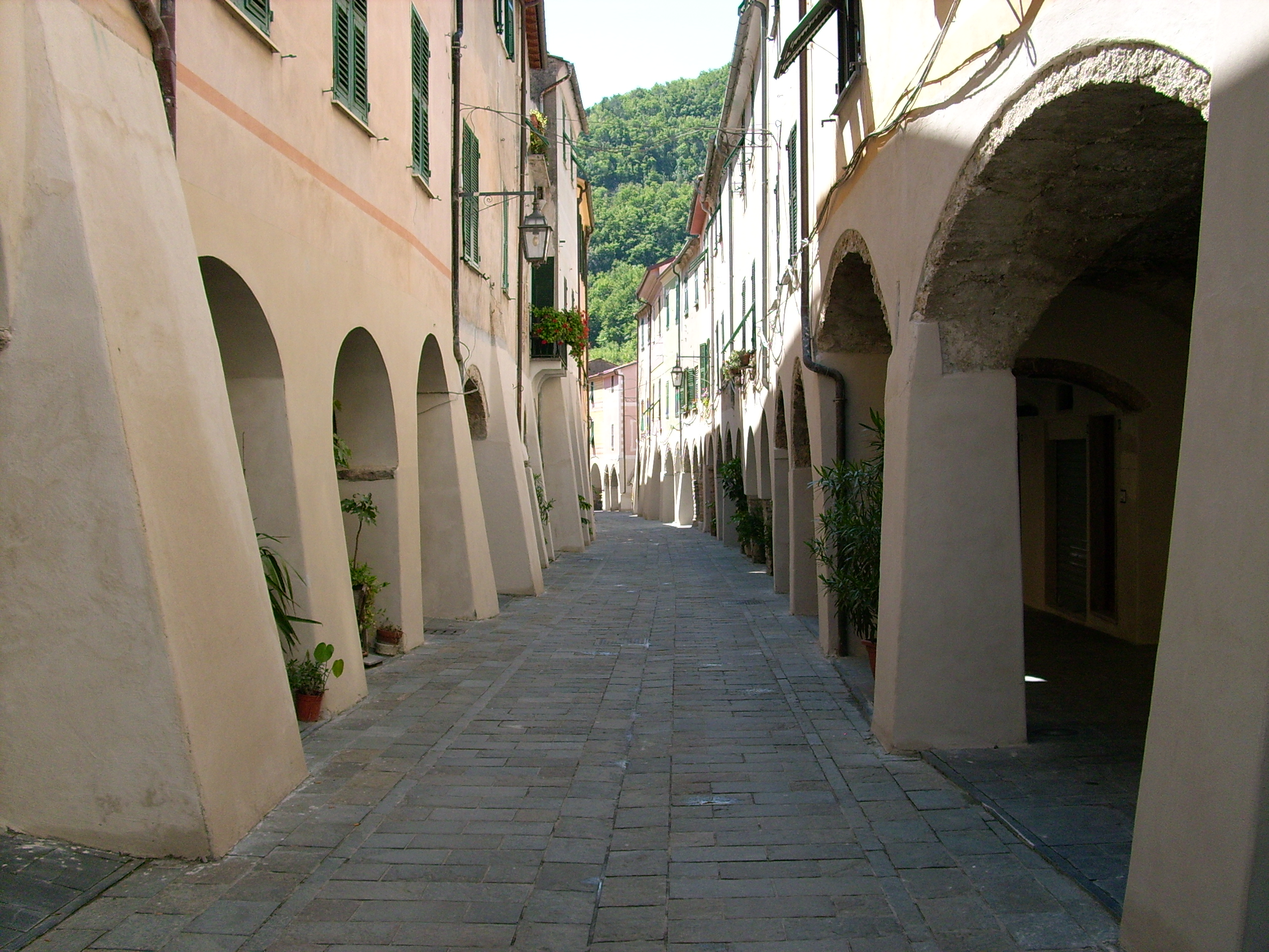 Zuccarello, Liguria, Italia